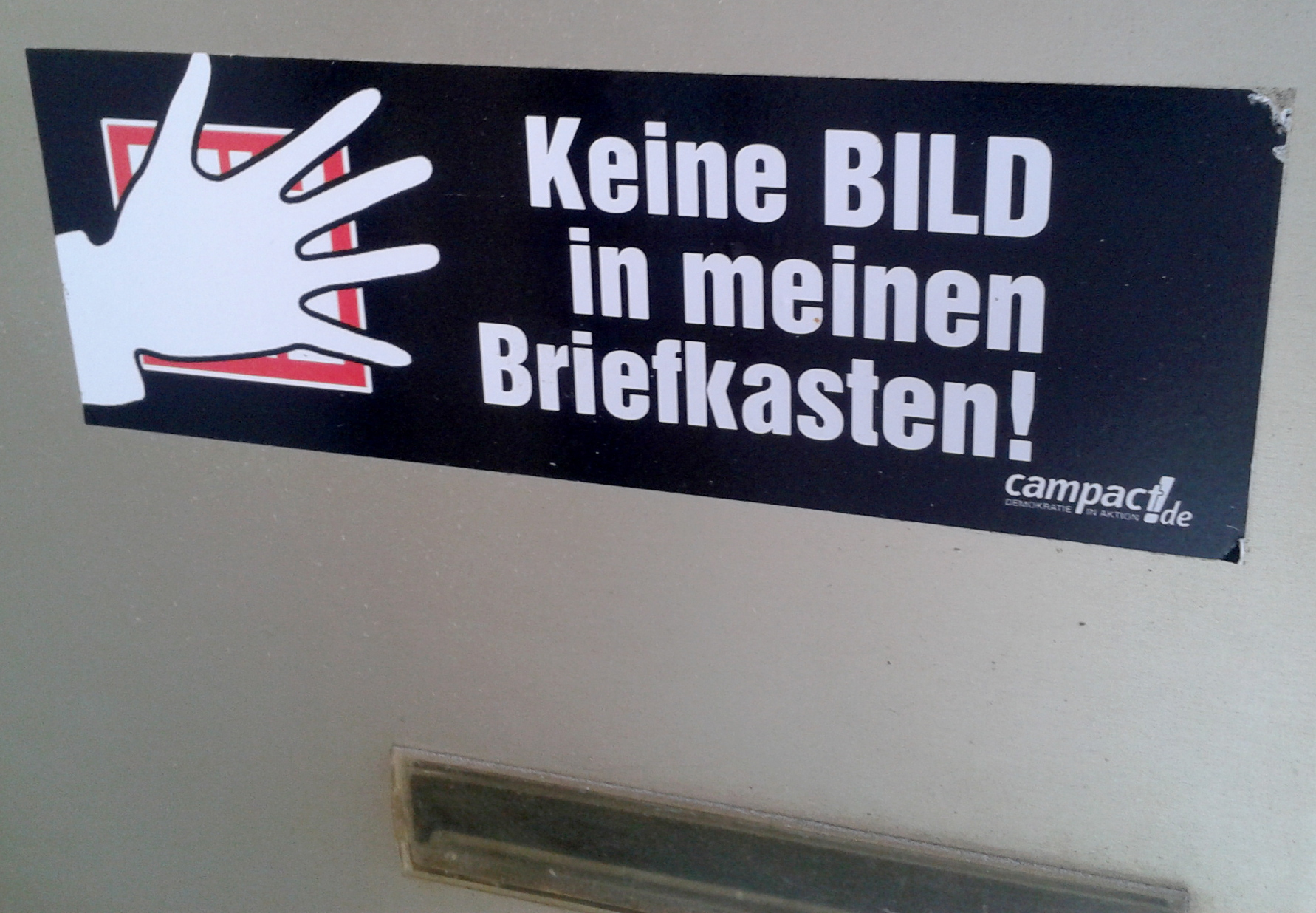 Aufkleber "Keine Bild" an einem Briefkasten in der Mannheimer Innenstadt